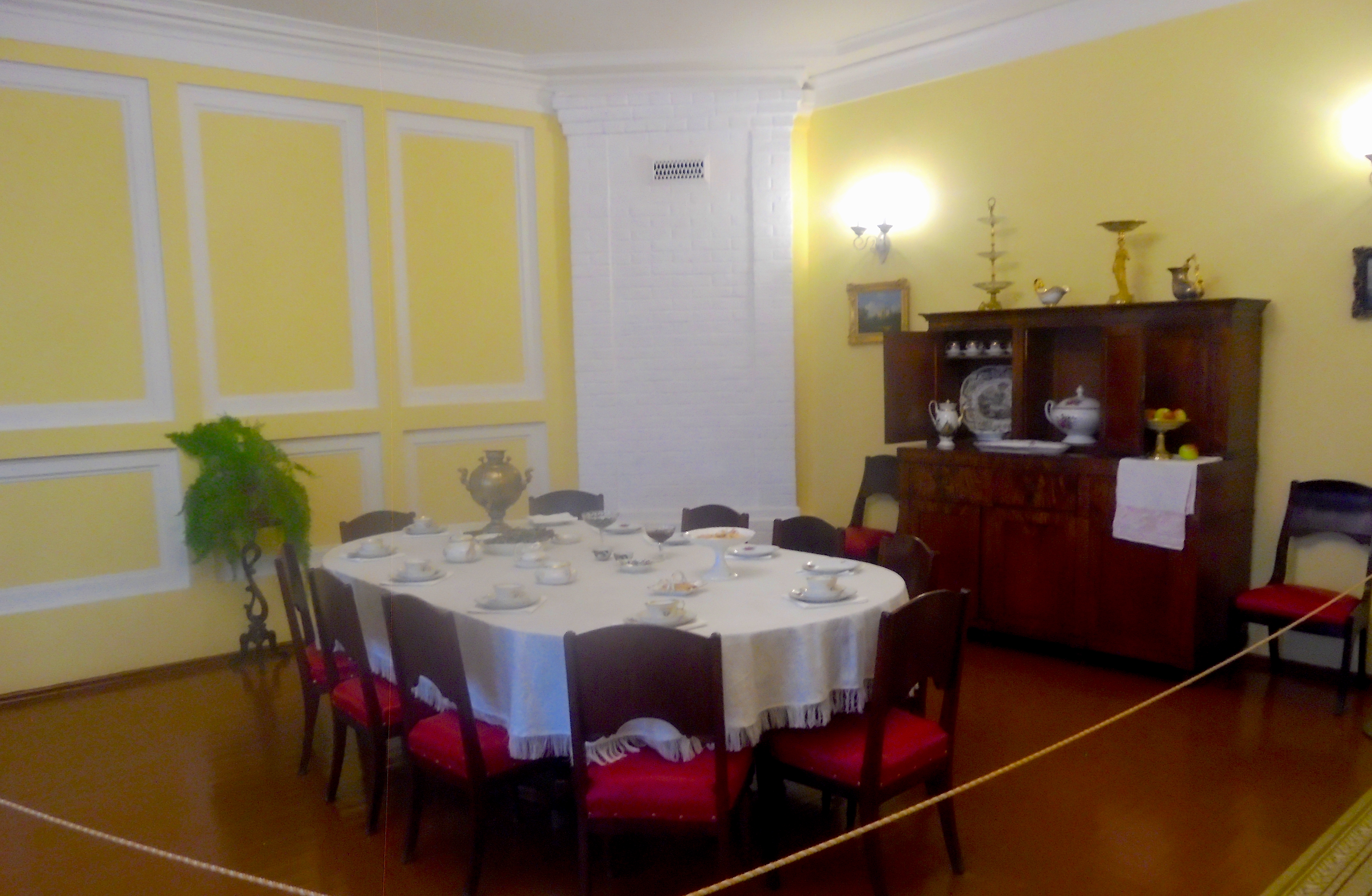 Столовая